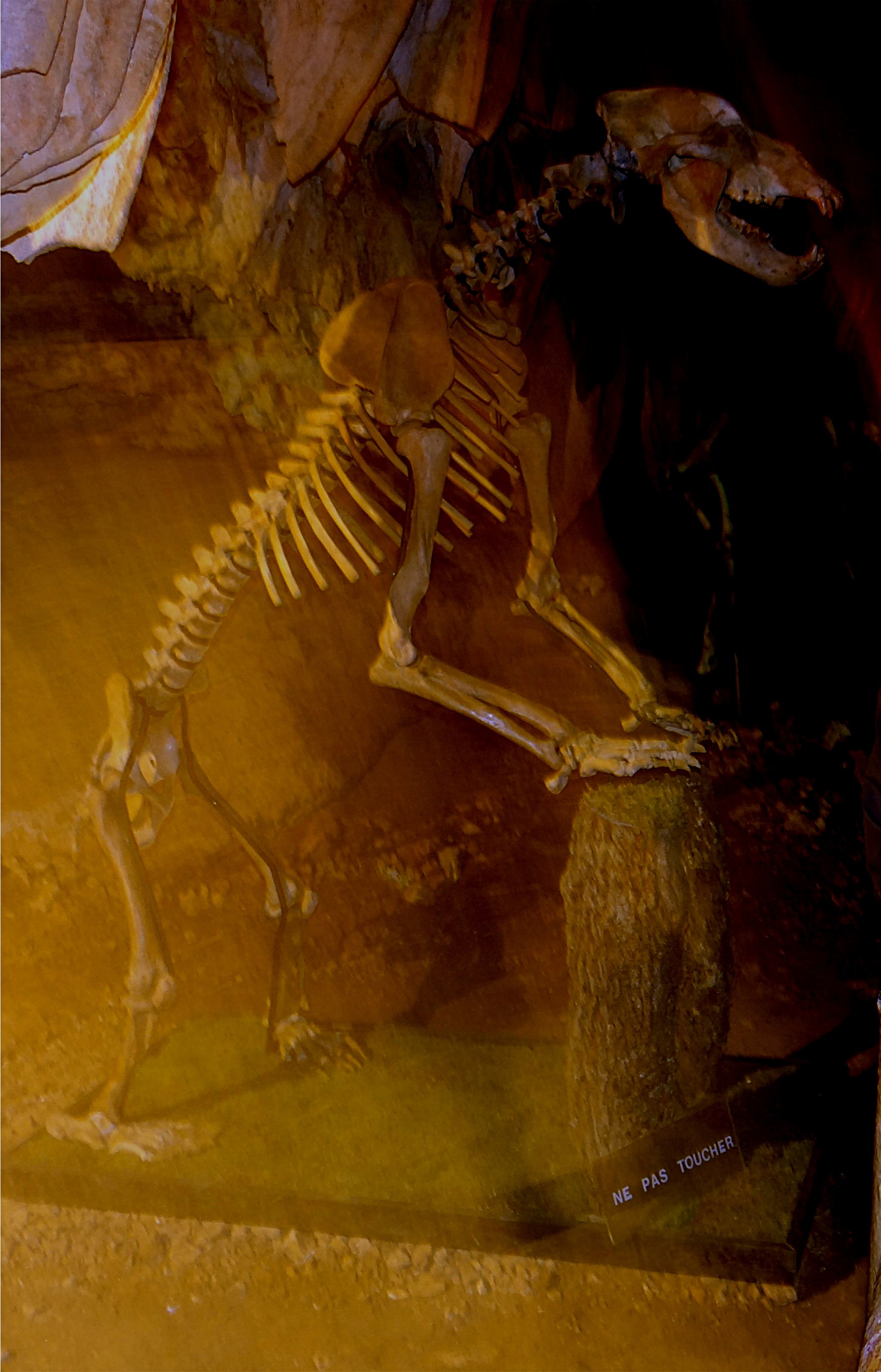 Squelette d'un Ours des cavernes, Aven-Marzal, Saint-Remèze, Ardèche, France.